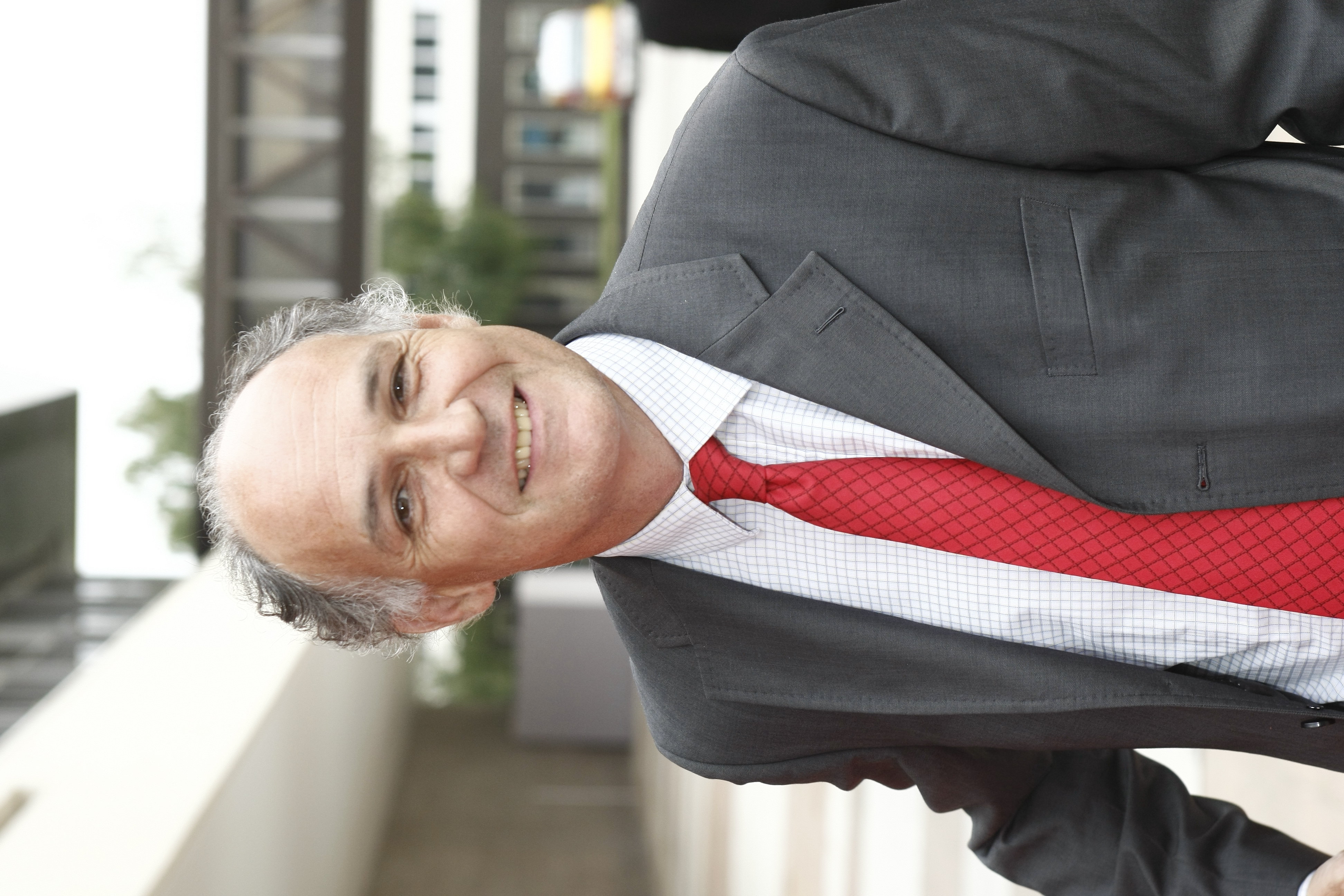 Pierre-André de Chalendar (né en 1958), nommé président directeur général (2007) de Saint-Gobain à la suite de Jean-Louis Beffa.